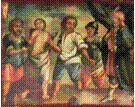 Affresco raffigurante il martirio di S. Febronia nella cappella a Lei dedicata presso la Chiesa Madre di Palagonia (CT)